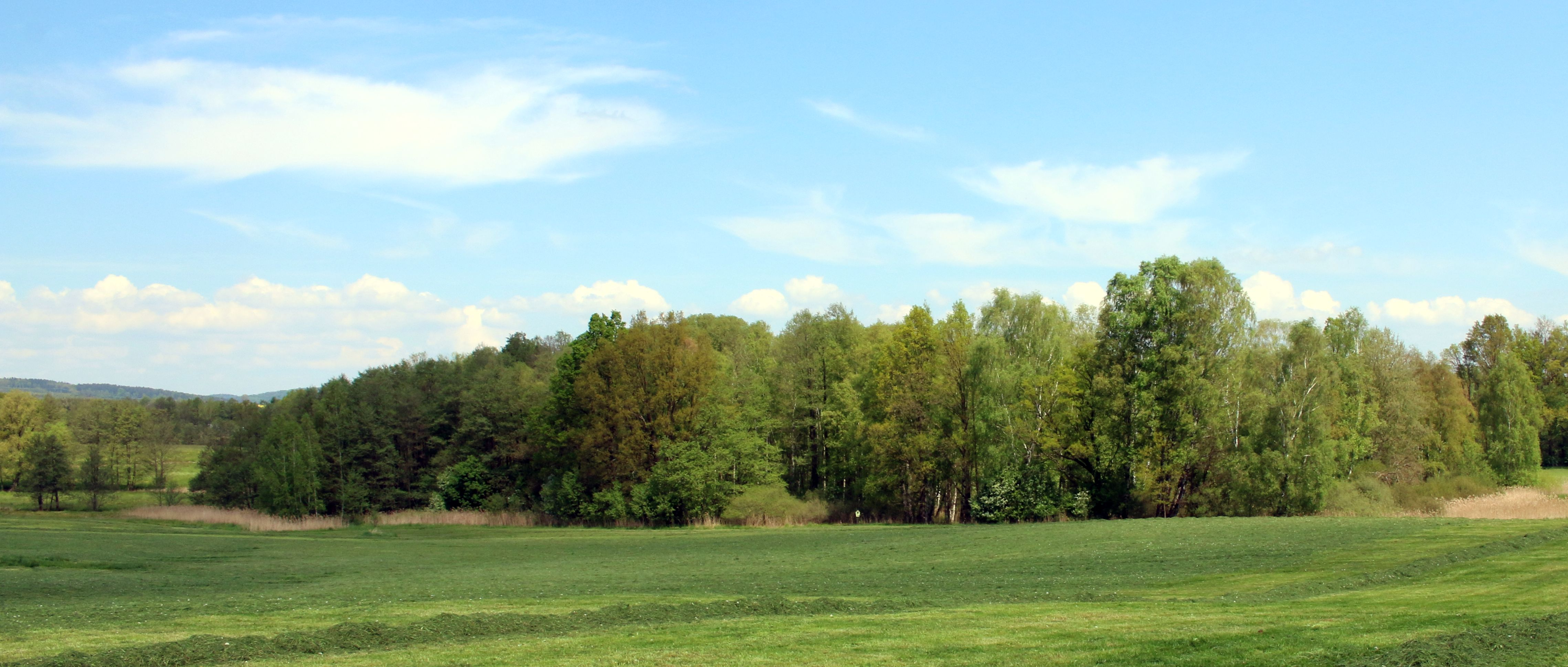 Die Frankenthaler Moorwiese war ein Flächennaturdenkmal auf der Flur der sächsischen Gemeinde Frankenthal und befindet sich im Landschaftsschutzgebiet Westlausitz. Sie ist heute Teil des FFH-Gebietes Obere Wesenitz und Nebenflüsse.